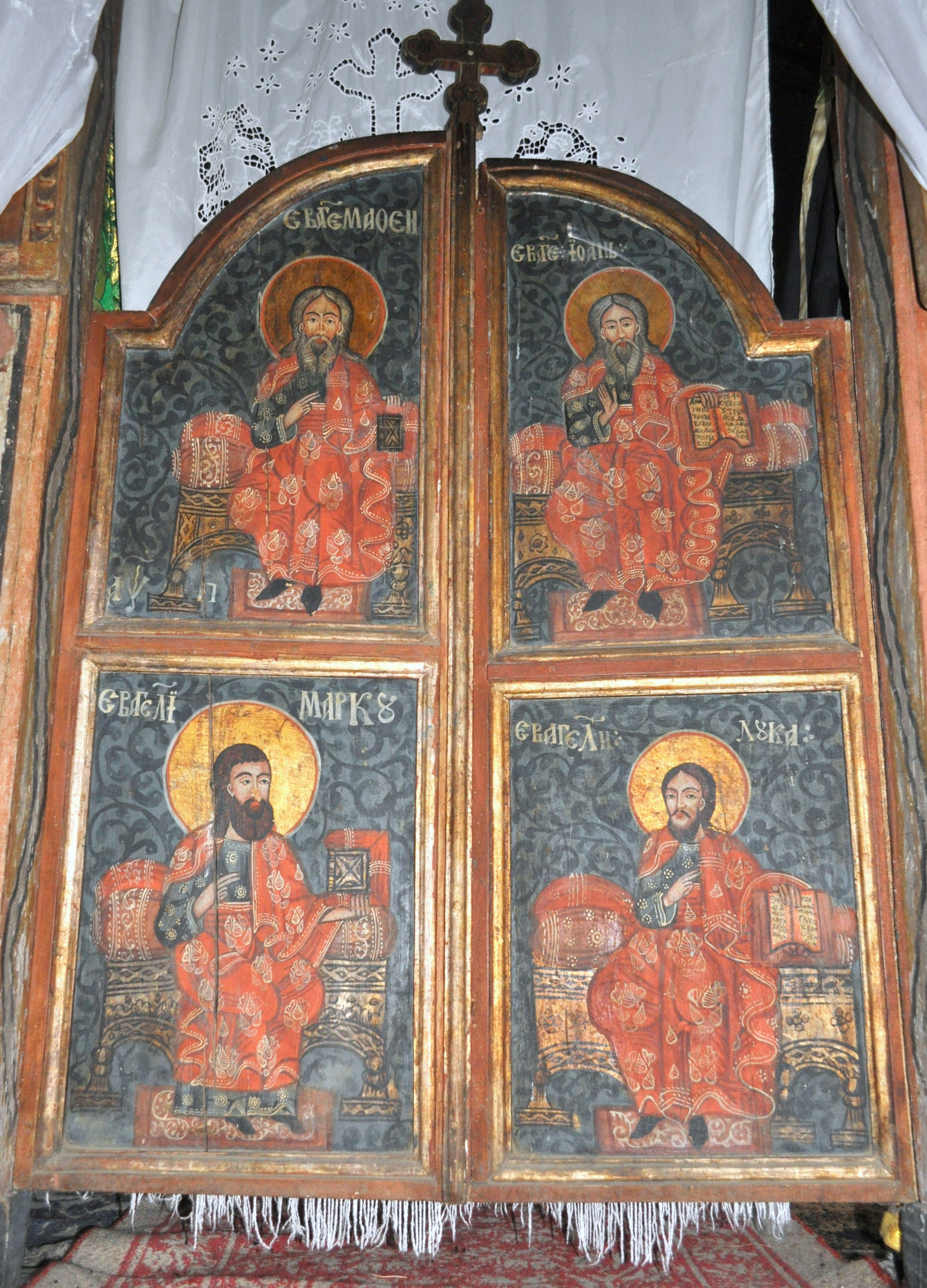 Biserica de lemn "Buna Vestire" din Ciungani, județul Hunedoara